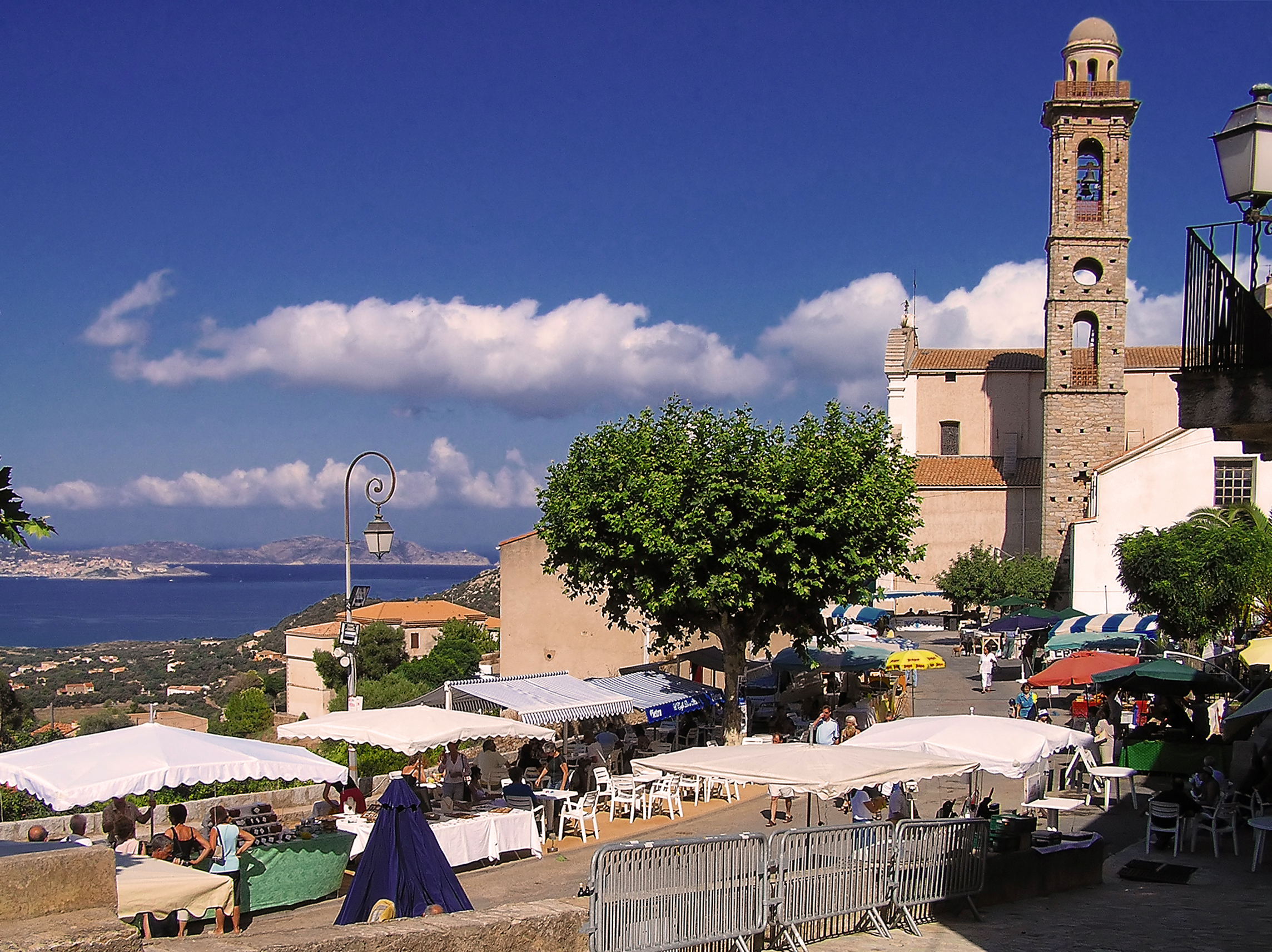 Lumio - Fiere di a petra